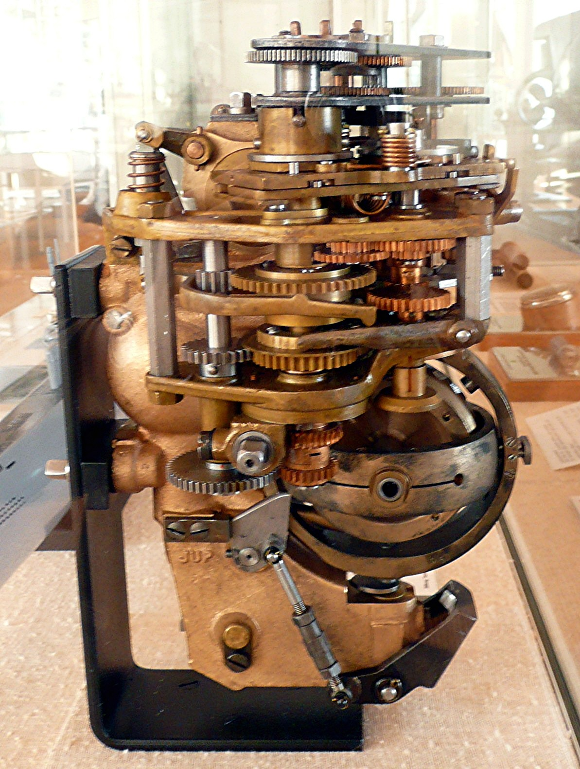 Steuereinheit eines deutschen Torpedos, sogenannter Federapparat eines Flächenabsuchtorpedos. Ausgestellt im Deutschen Schiffahrtsmuseum Bremerhaven.